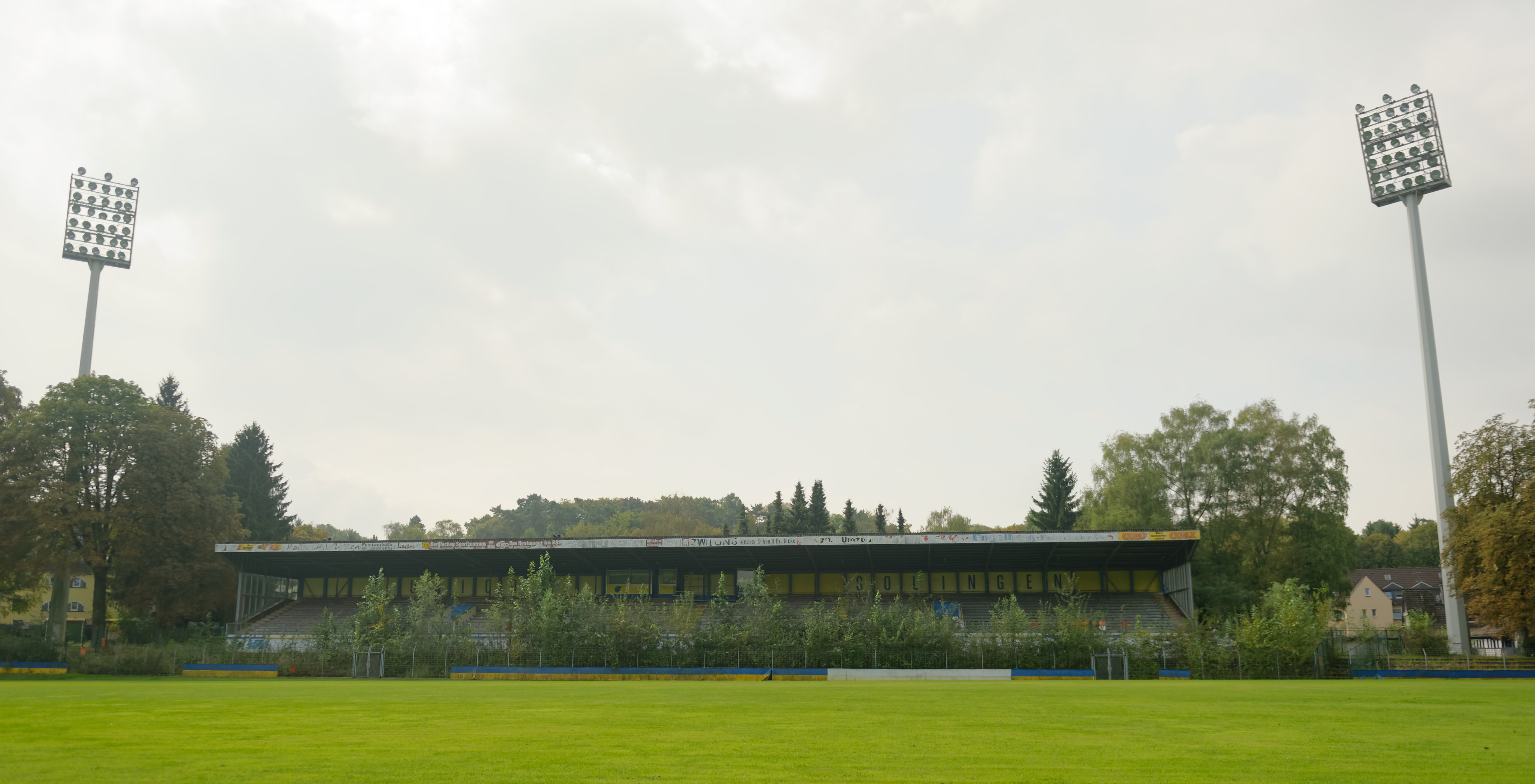 Stadion am Hermann-Löns-Weg im Herbst 2014